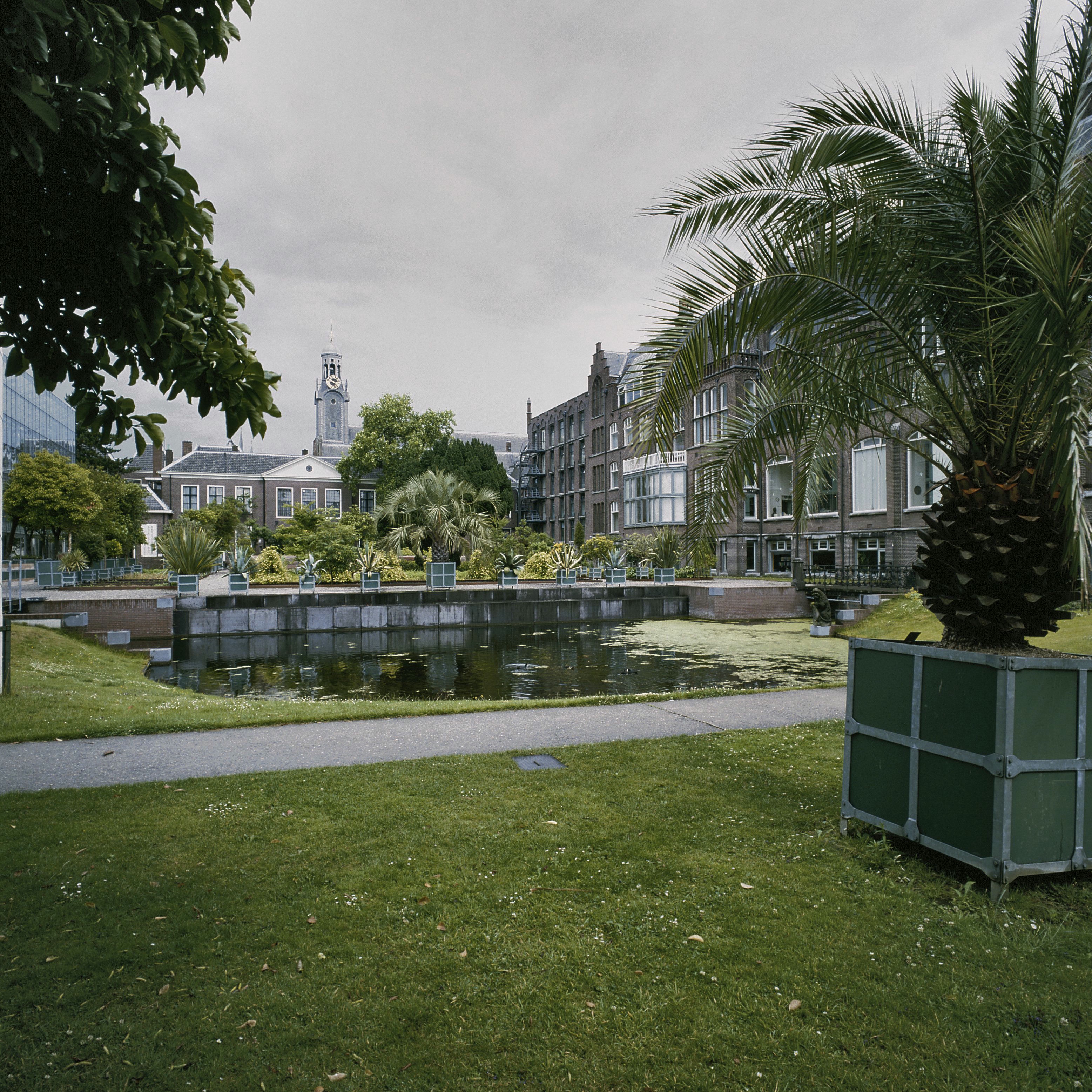 Universiteit: Overzicht (opmerking: Gefotografeerd voor ANWB Monumentenboek)